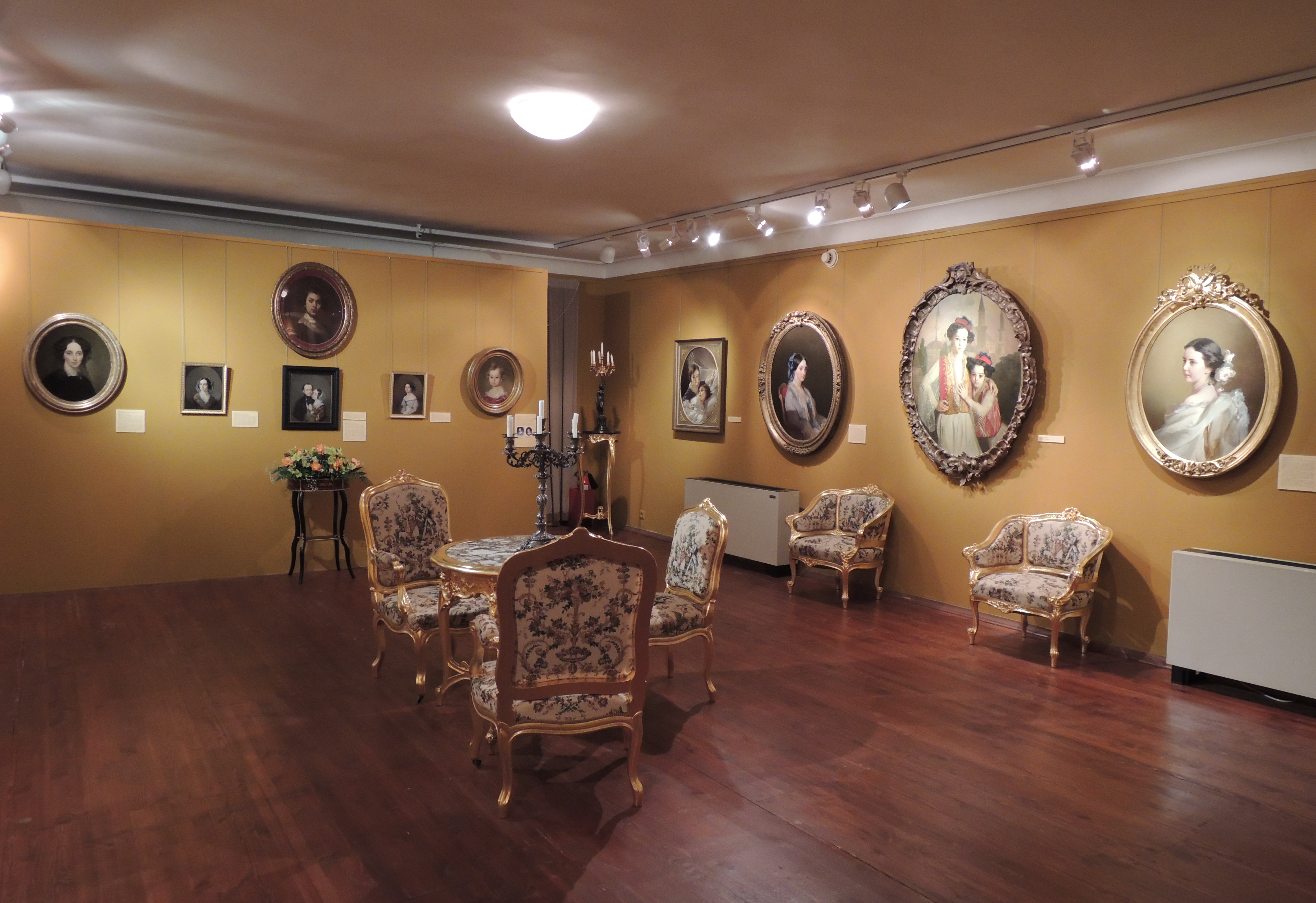 «Знакомцы давние». Иван Макаров. Монографическая выставка известного русского живописца к 200-летию Н.Н. Пушкиной-Ланской (Гончаровой) и 190-летию художника. 45 портретов из 14 музеев России впервые собраны вместе. Выставка, подготовленная Государственным музеем А.С. Пушкина на Пречистенке совместно с Мордовским республиканским музеем им. С.Д. Эрьзи (г. Саранск) и при участии московских, петербургских и региональных музеев.